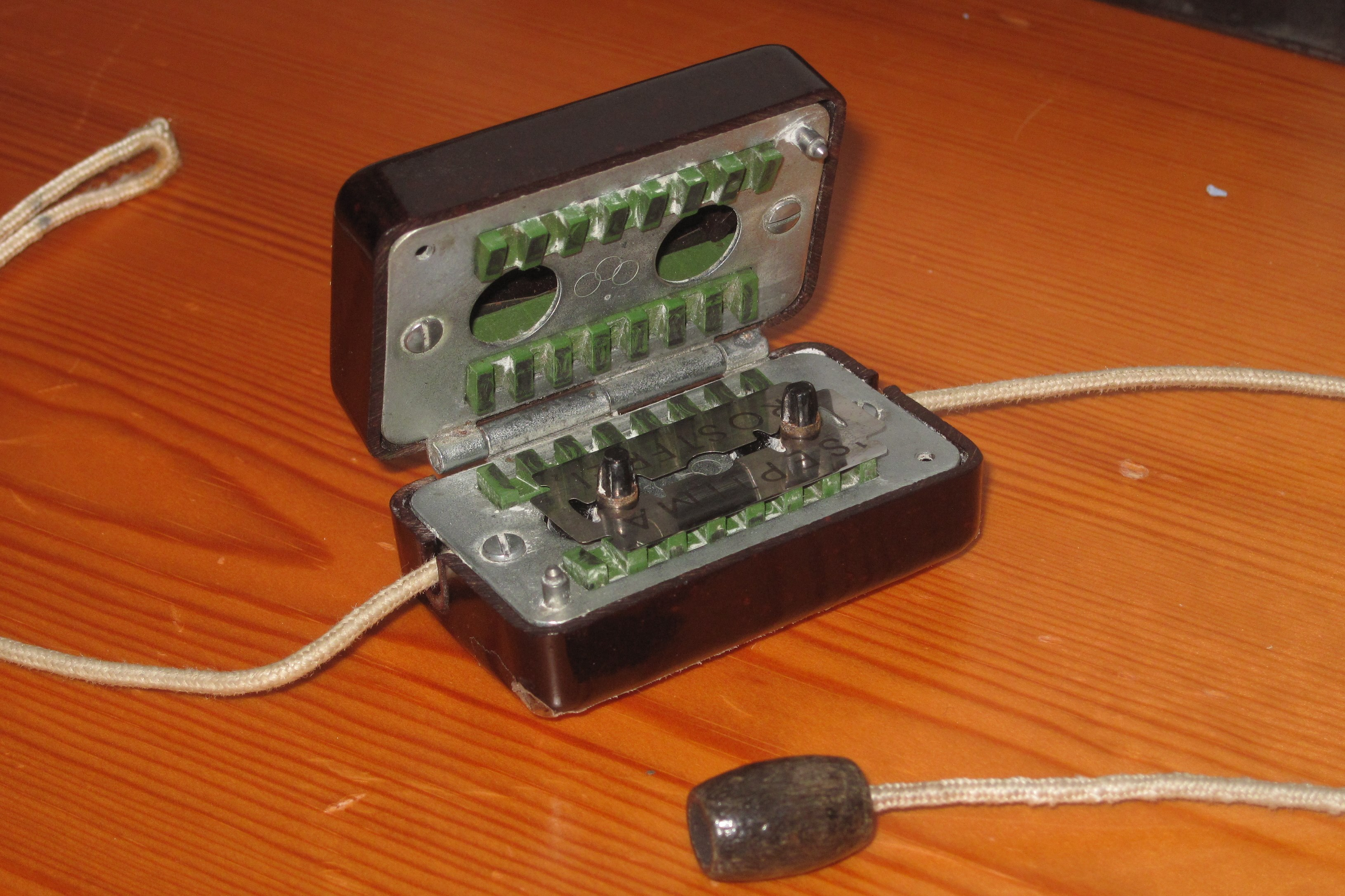 Bakelitmuseum in Kierspe, Friedrich-Ebert-Str. 380. Rasierklingenschärfer aus Bakelit.